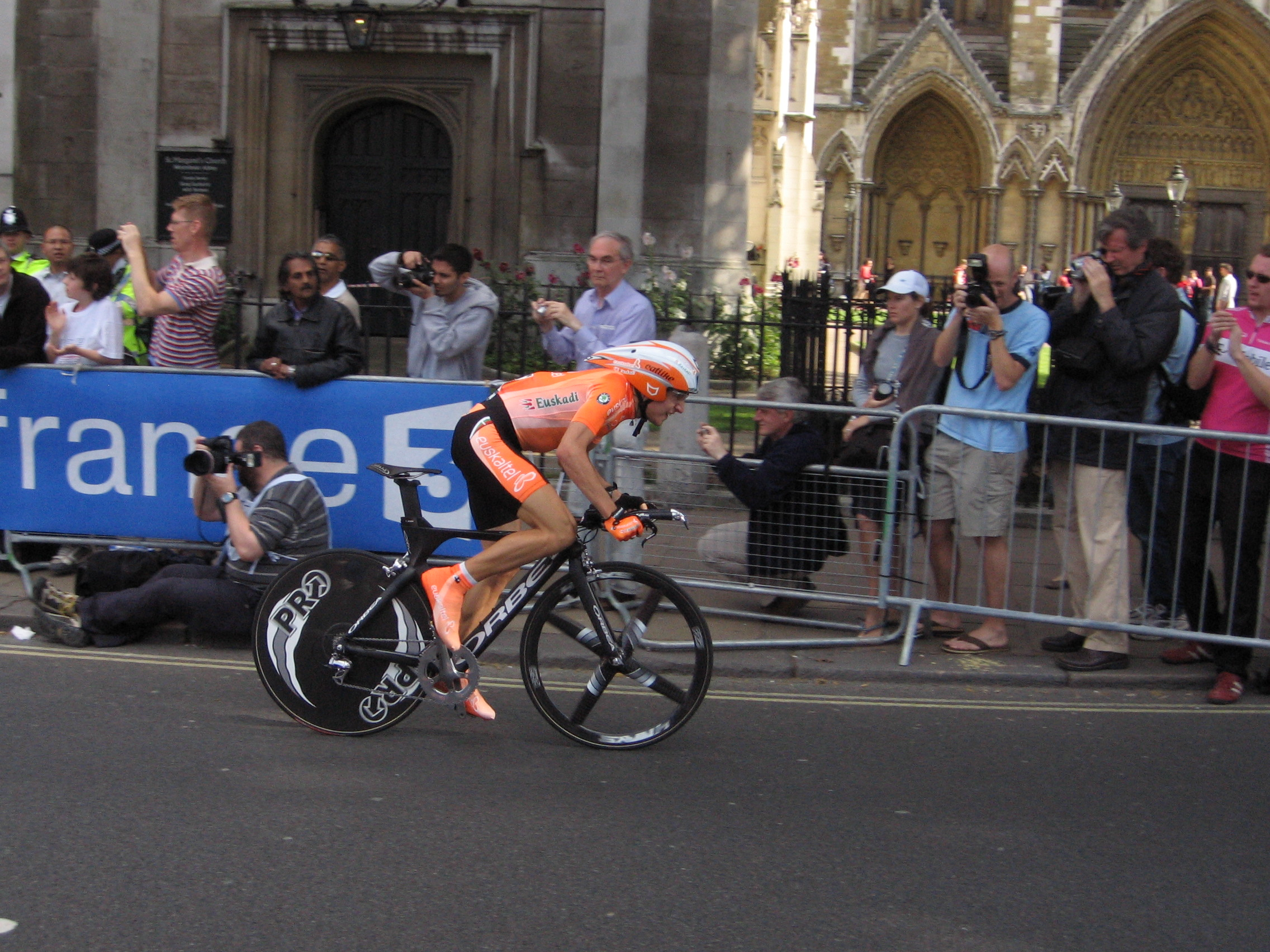 Igor Anton, prologue Tour de France 2007 (London)